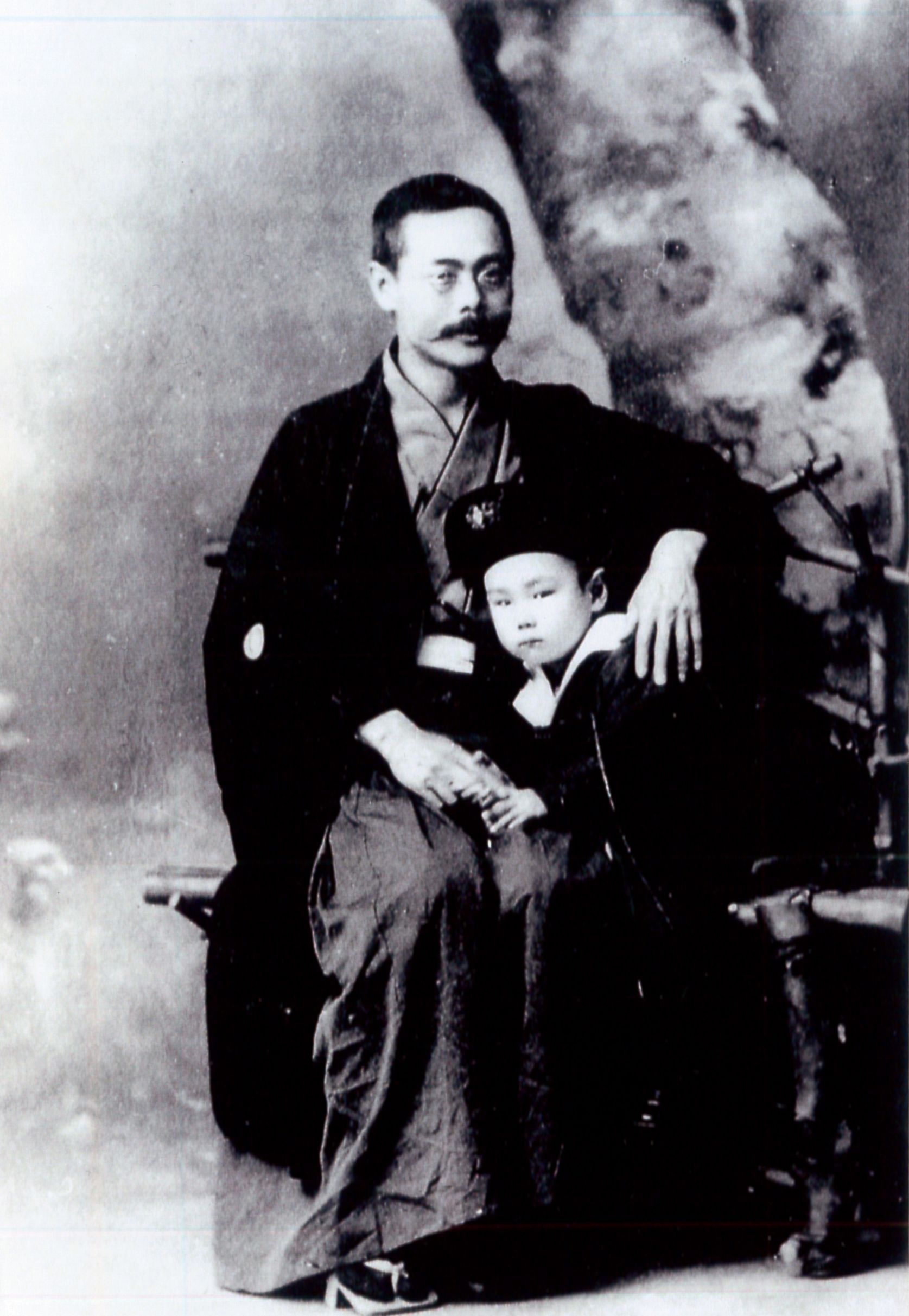 二木謙三と長男順益